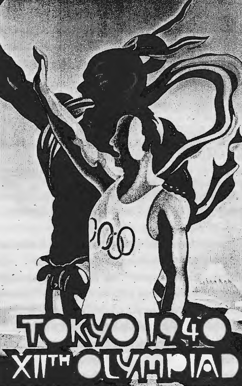 Poster der Olympischen Sommerspiele 1940 in Tokio von Wada Sanzō, veröffentlicht 1940 im offiziellen Bericht des Organisationskomitees der Spiele.